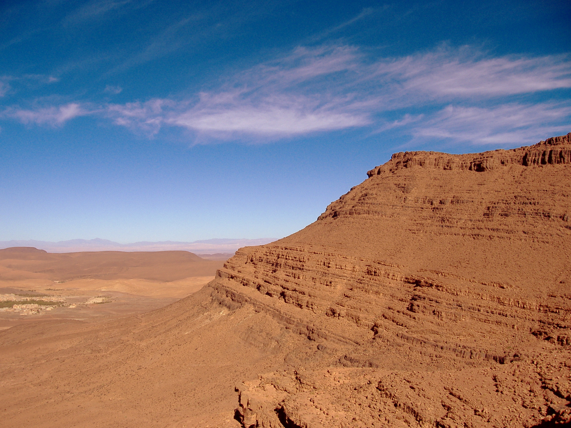 Photo taken near Ouarzazate (Marocco)